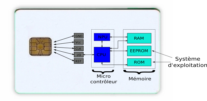 Principe de base d'une smartCard